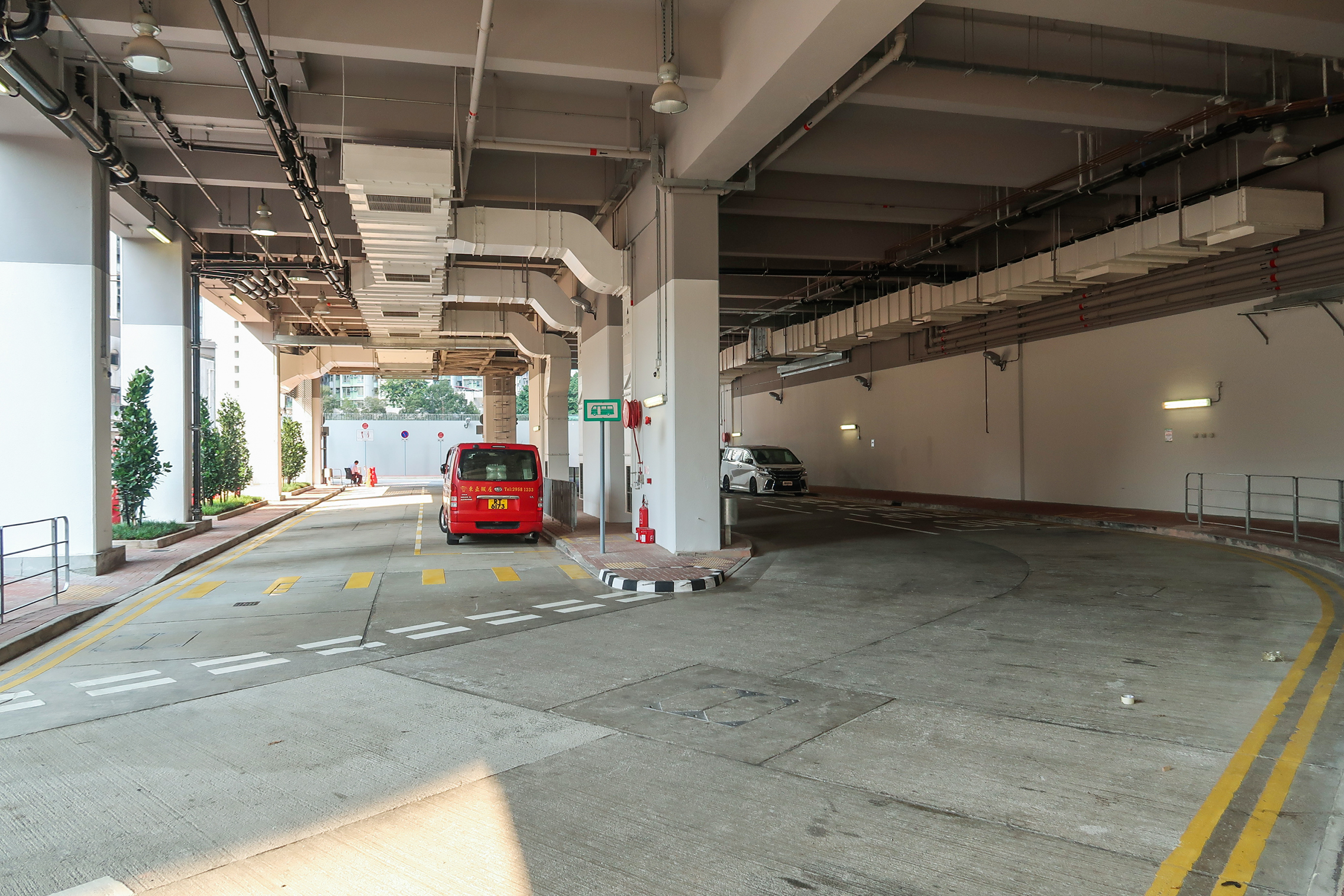 Kwai Tsui Estate Minibus Terminal